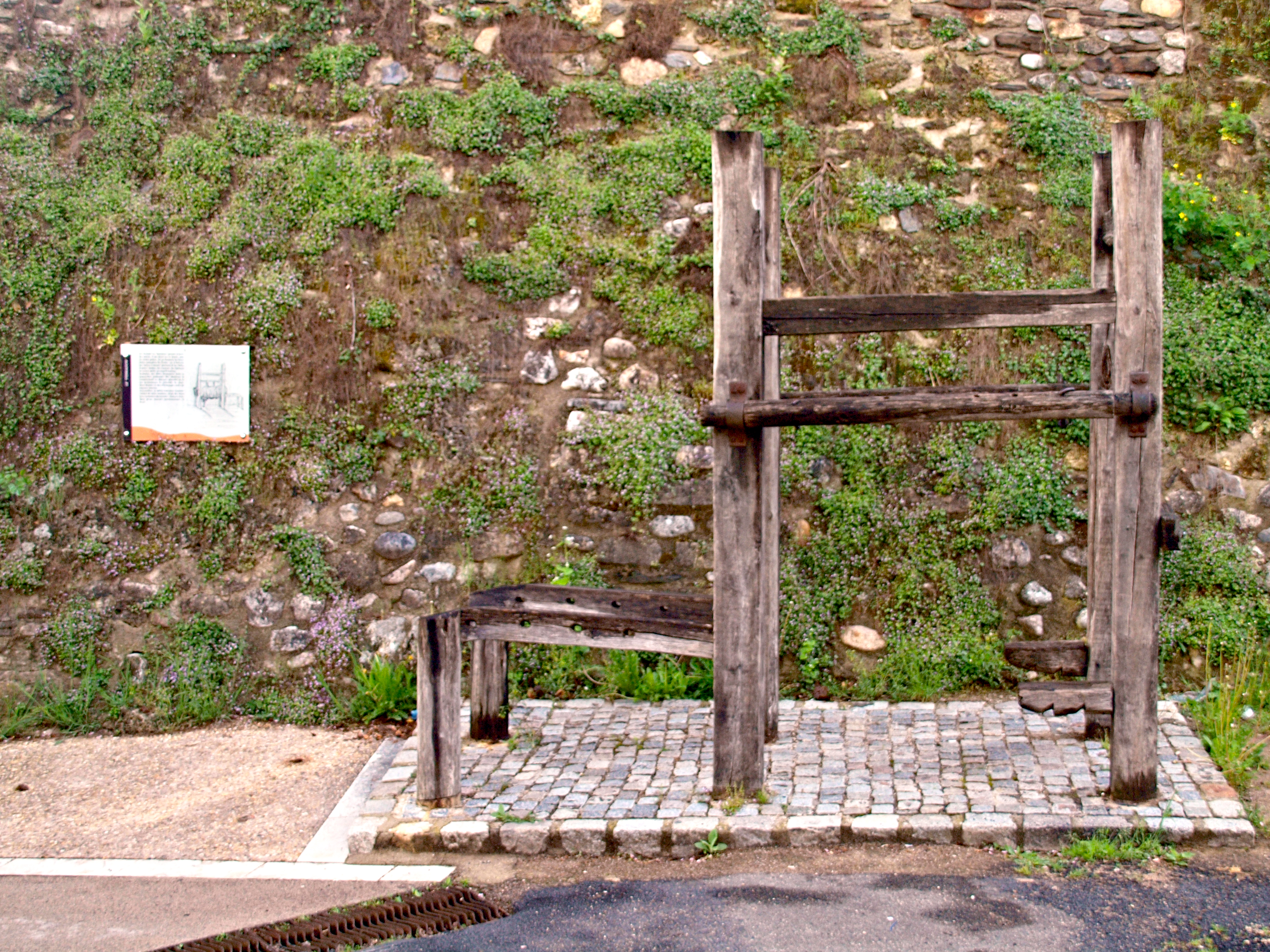 Florac (Lozère) - Le "travail" ou ferradou pour ferrer les bœufs.